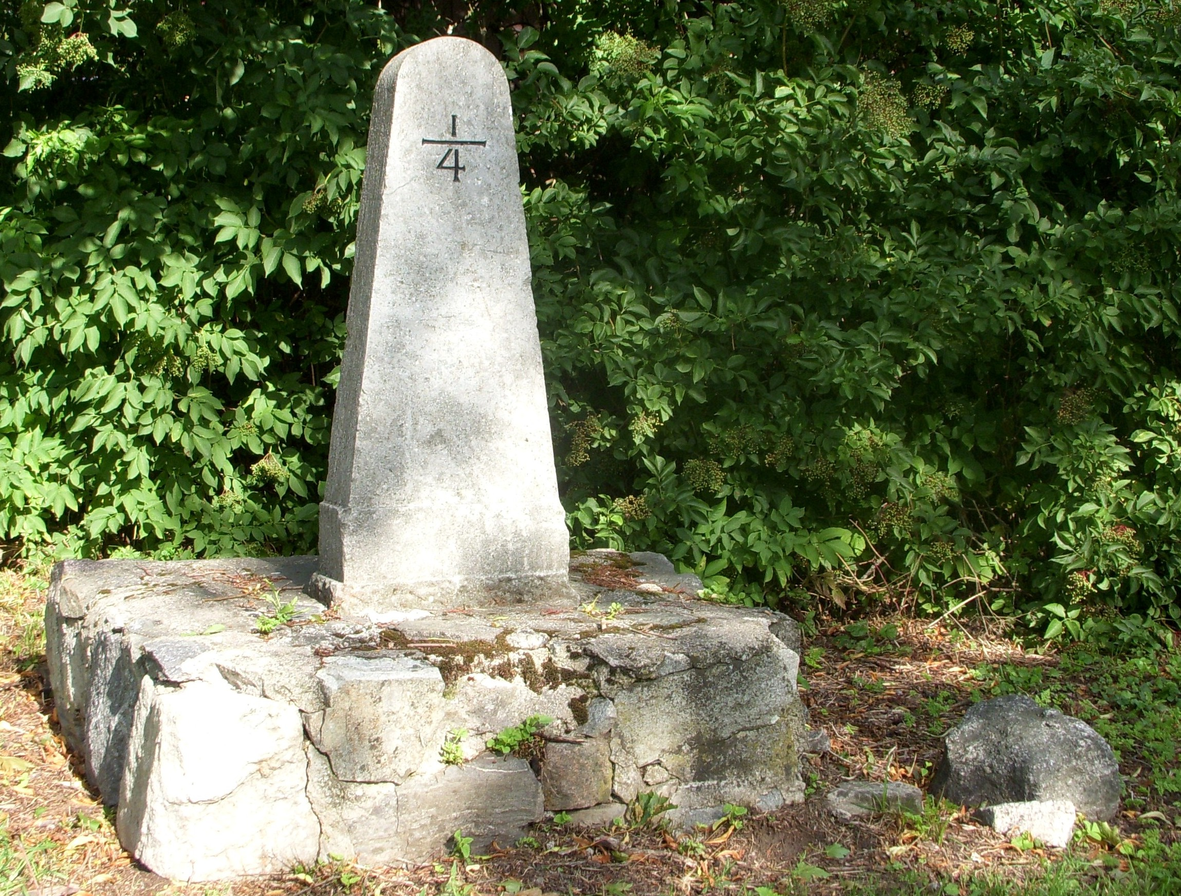 Milstoplen vid Blackebergsvägen i Bromma, Stockholm